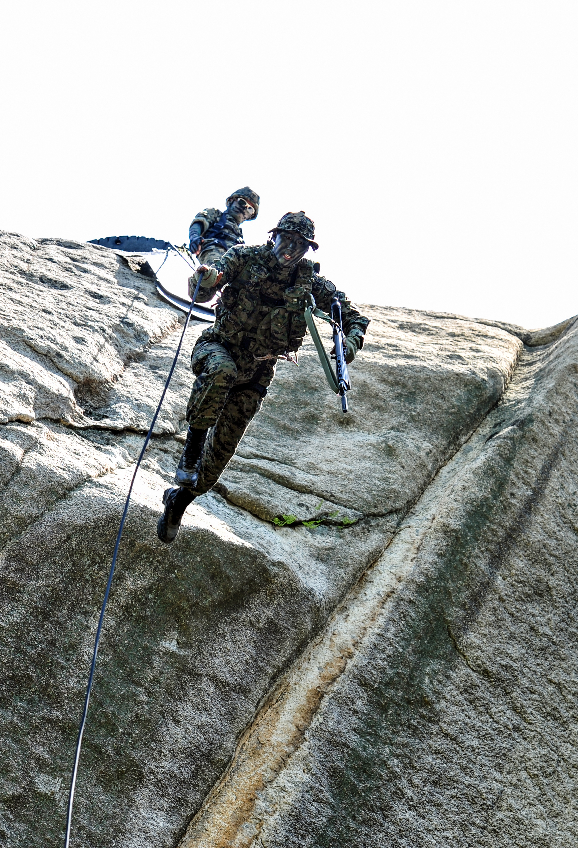 촬영 : 임영식